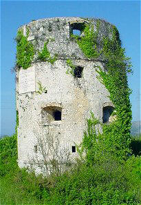 Kula Norinska-izvana